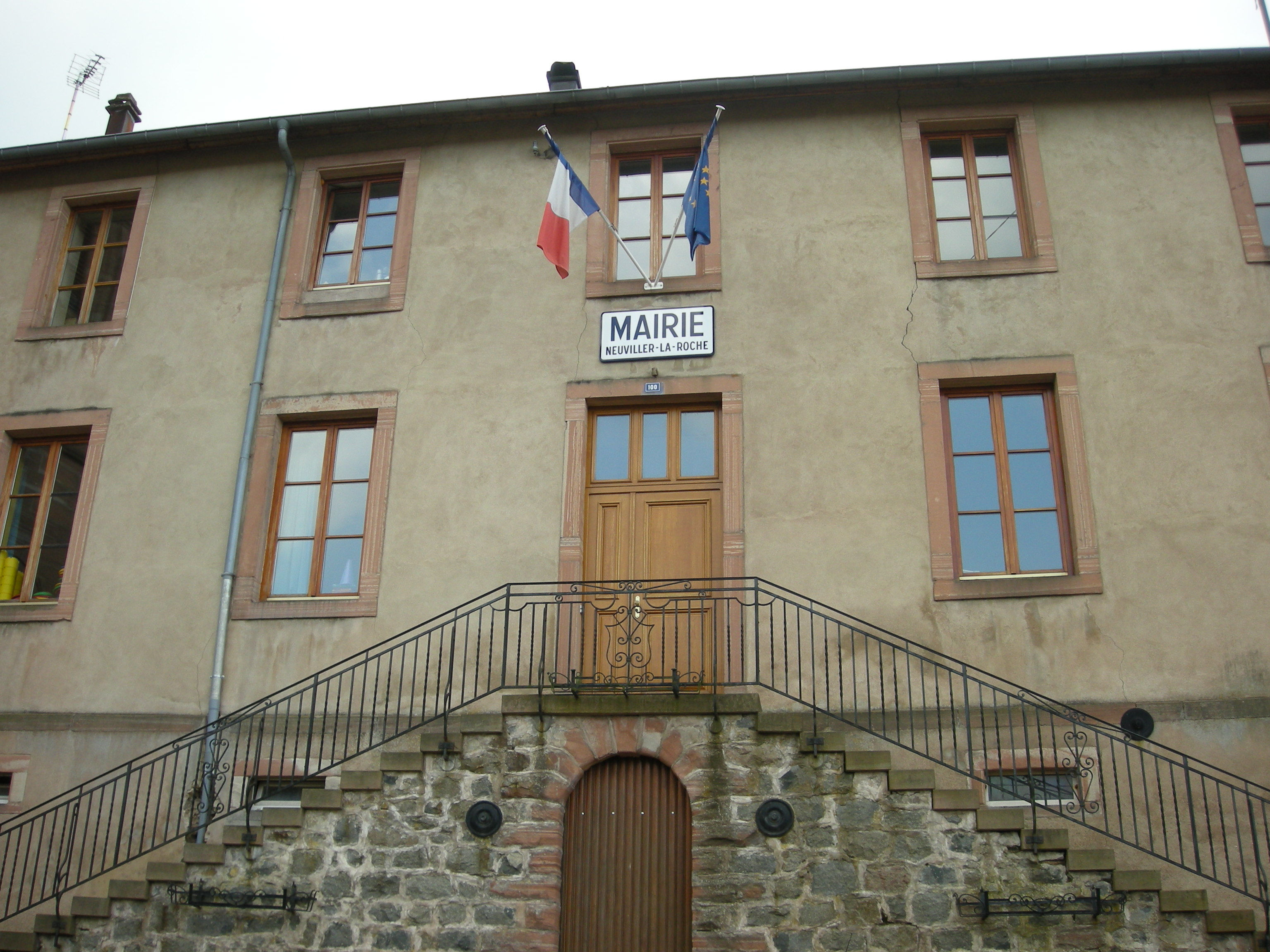 La mairie de Neuviller-la-Roche (Bas-Rhin)